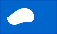 Complement